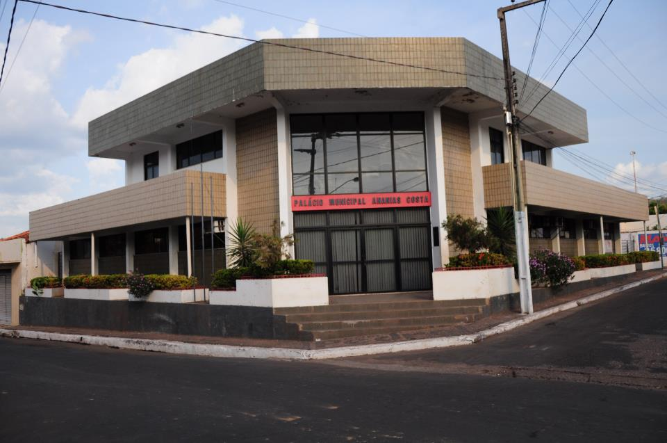 Foto do prédio da Prefeitura Municipal de Dom Pedro.